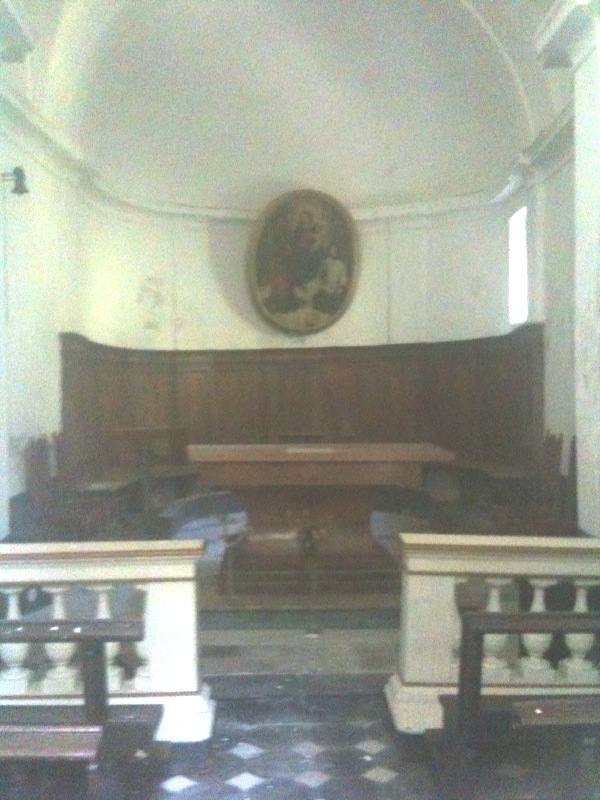 Cappella della Sacra Famiglia (Interno) in località Ritani del comune di Stella (SV) Italy